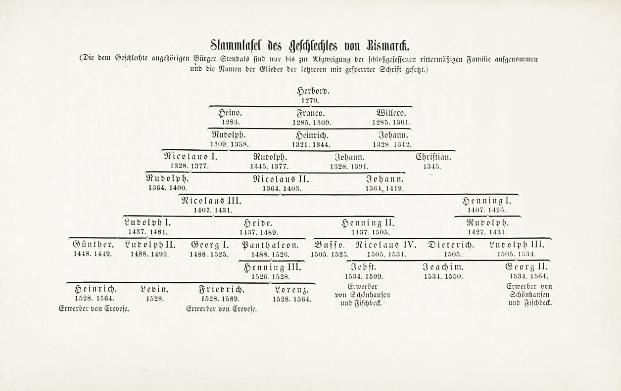 Stammtafel des Geschlechts von Bismarck (Auswahl: früheste Generationen; die dem Geschlechte angehörigen Bürger Stendals sind nur bis zur Abzweigung der schlossgesessenen rittermäßigen Familie aufgenommen und die Namen der letzteren mit g e s p e r r t e r Schrift gesetzt)